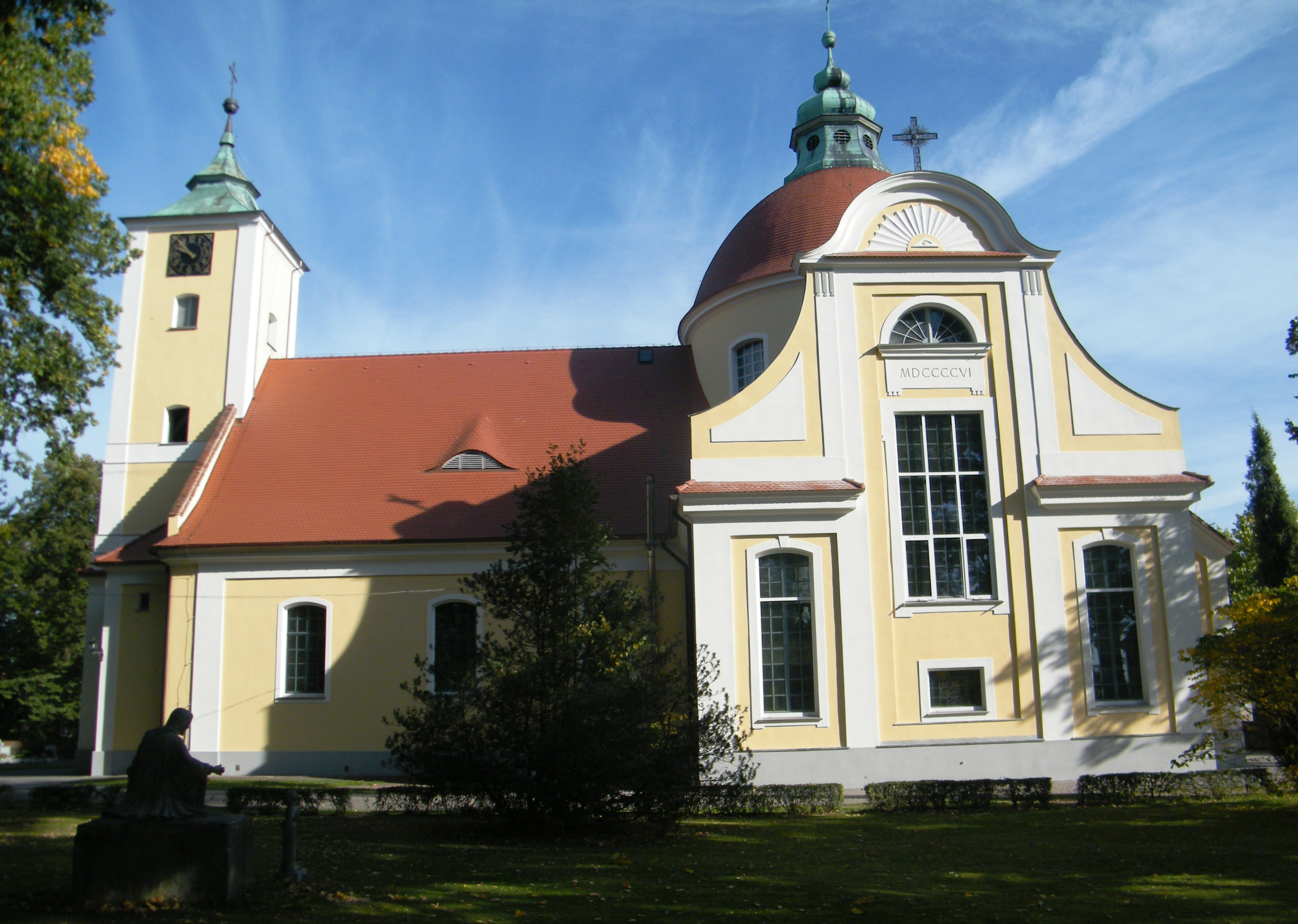 Bogacica - kościół parafialny pw. Świętej Trójcy, 1797-1805, 1905 (zabytek nr 1058/65 z 25.06.1965)